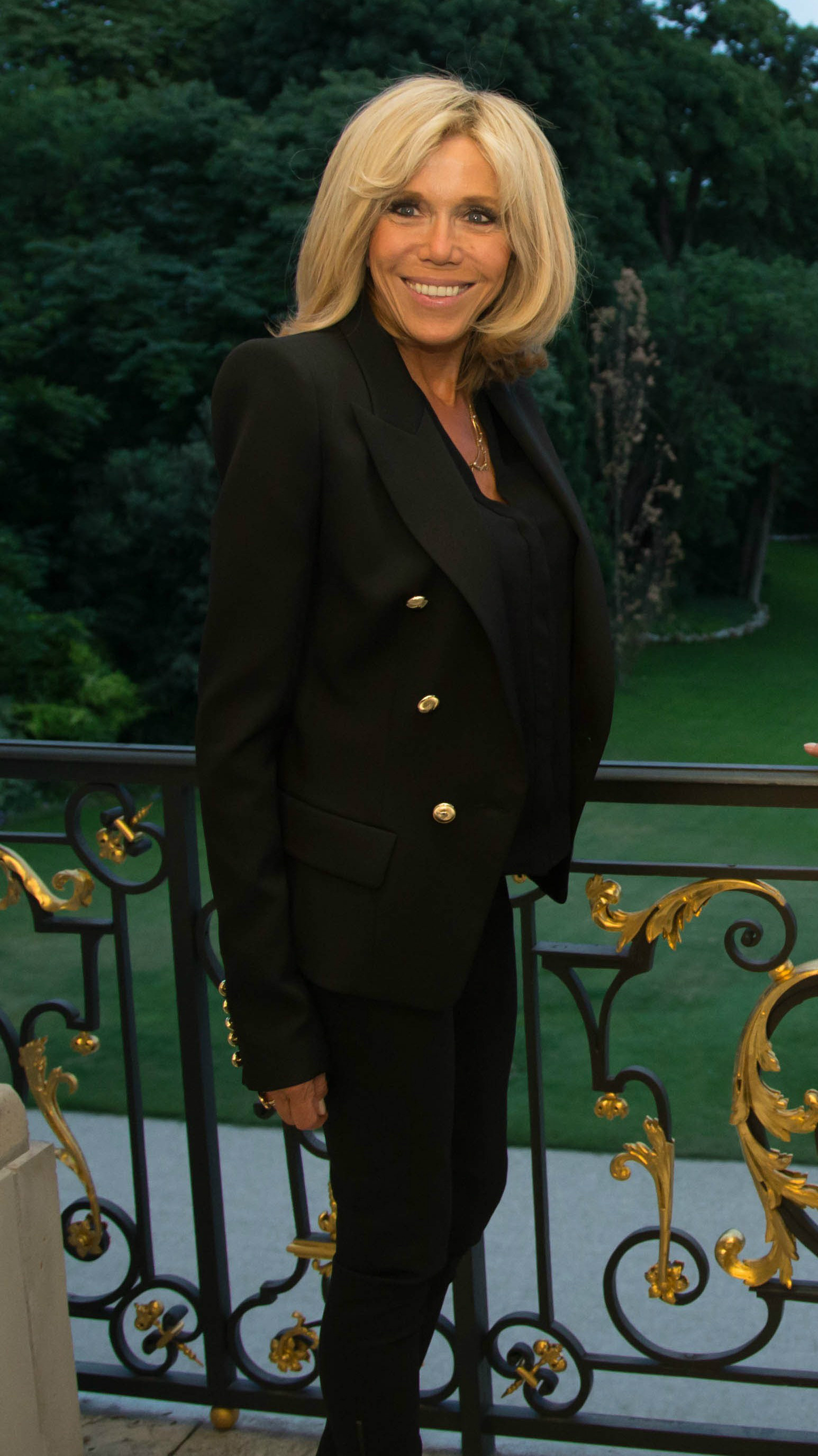 Brigitte Macron, la Première dame de France.